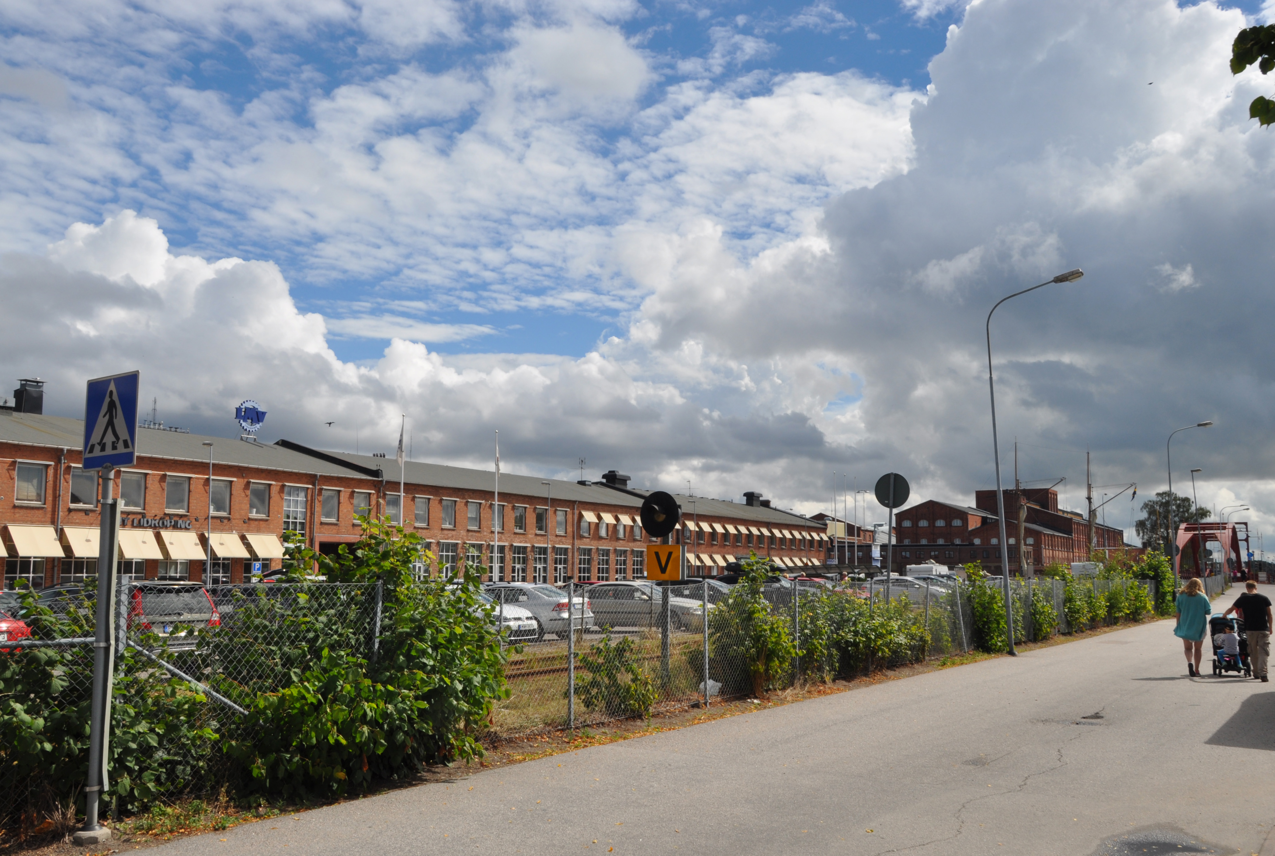 Byggnader för Lidköping Machine Tools, tidigare Lidköpings Mekaniska Vekstad